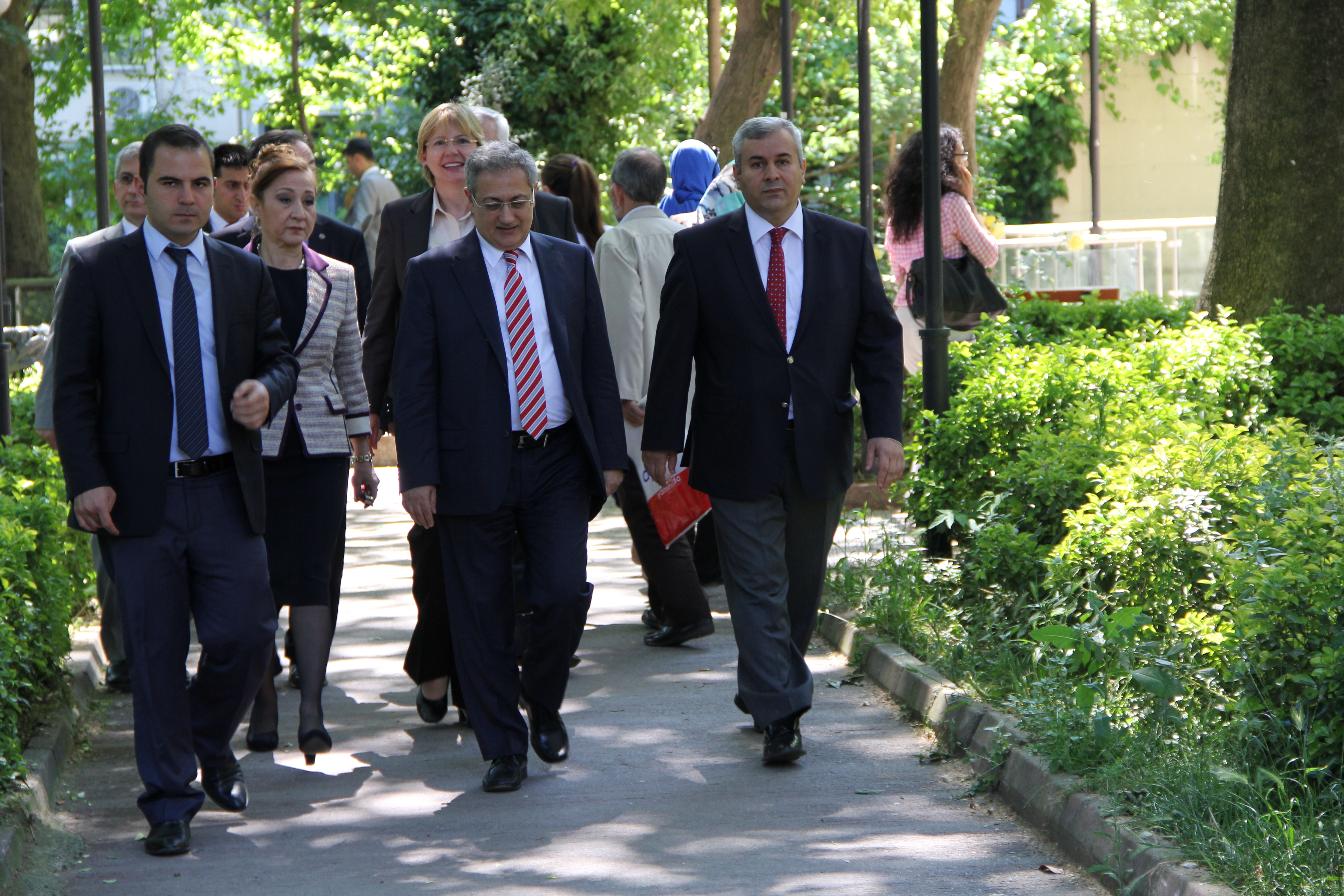 Marmara Üniversitesi Rektörü Prof.Dr. Zafer Gül Marmara İletişim Ziyareti